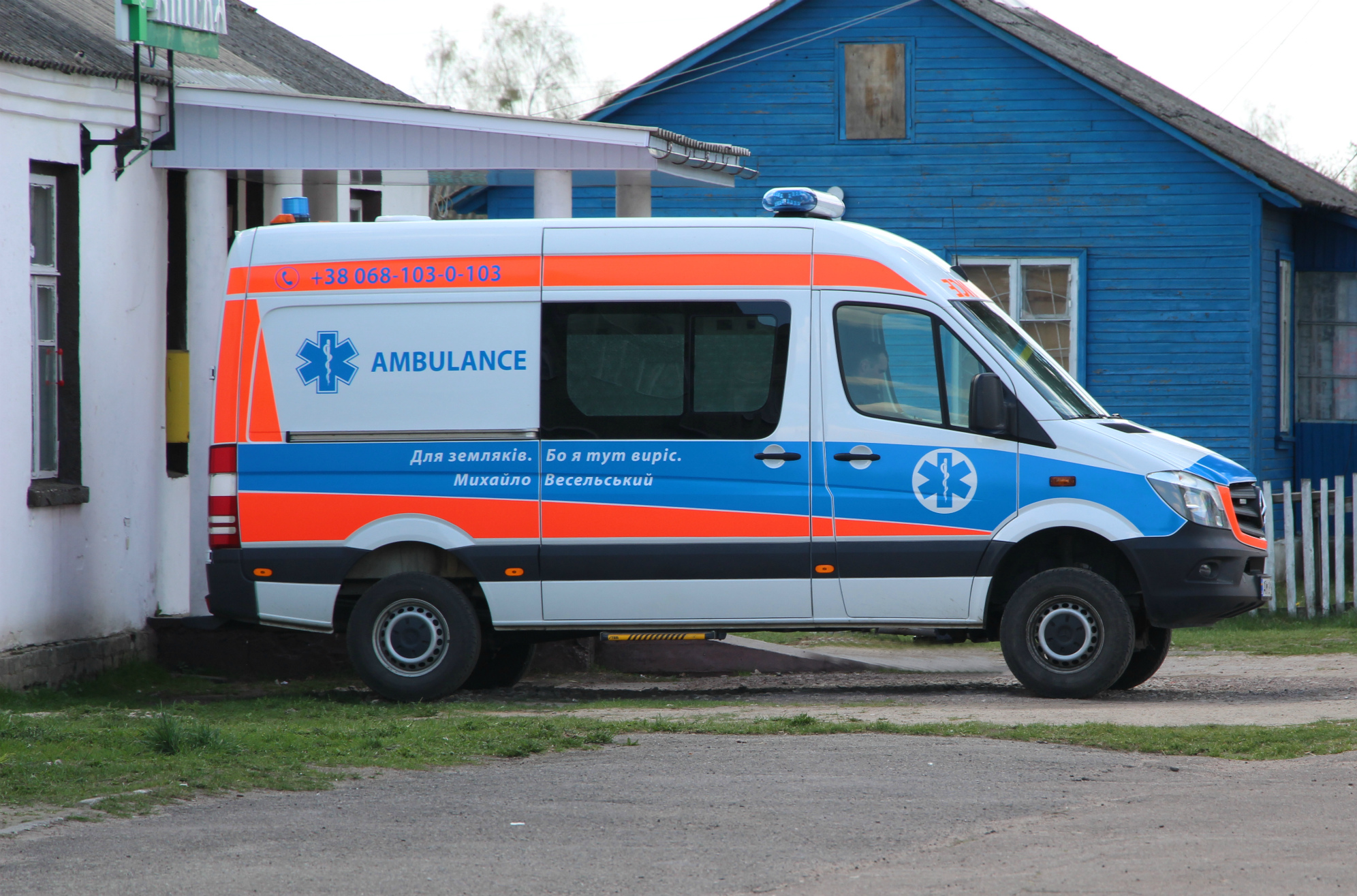 с. Радовель. Реамобіль. Сільська амбулаторія.